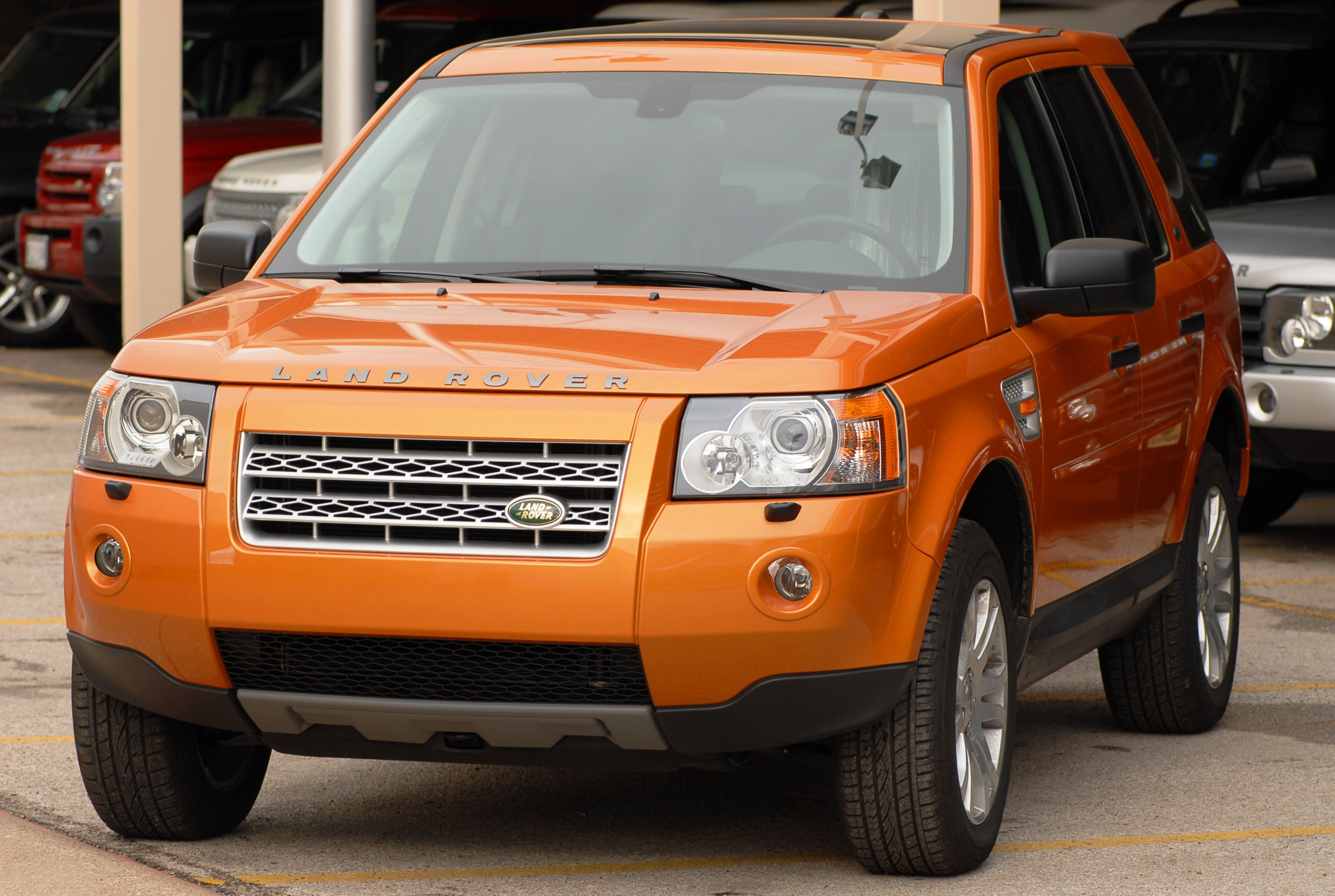 Land Rover Freelander (LR2) 2008 model